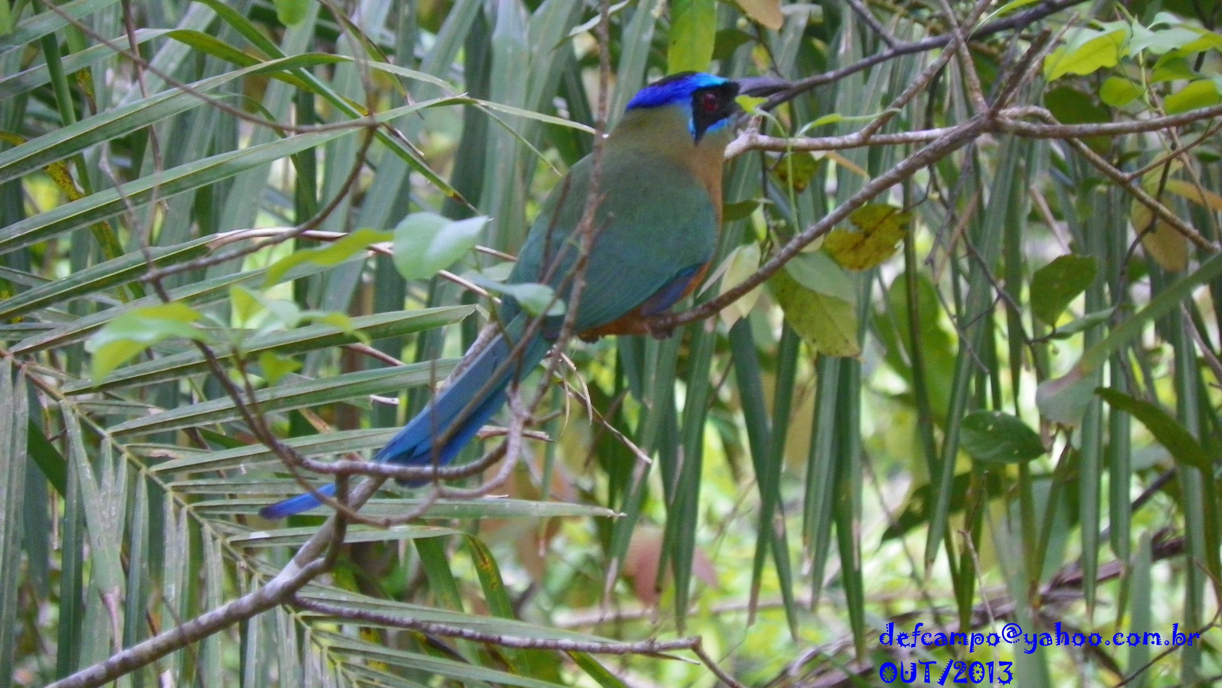 Udu-de-coroa-azul (Momotus momota).